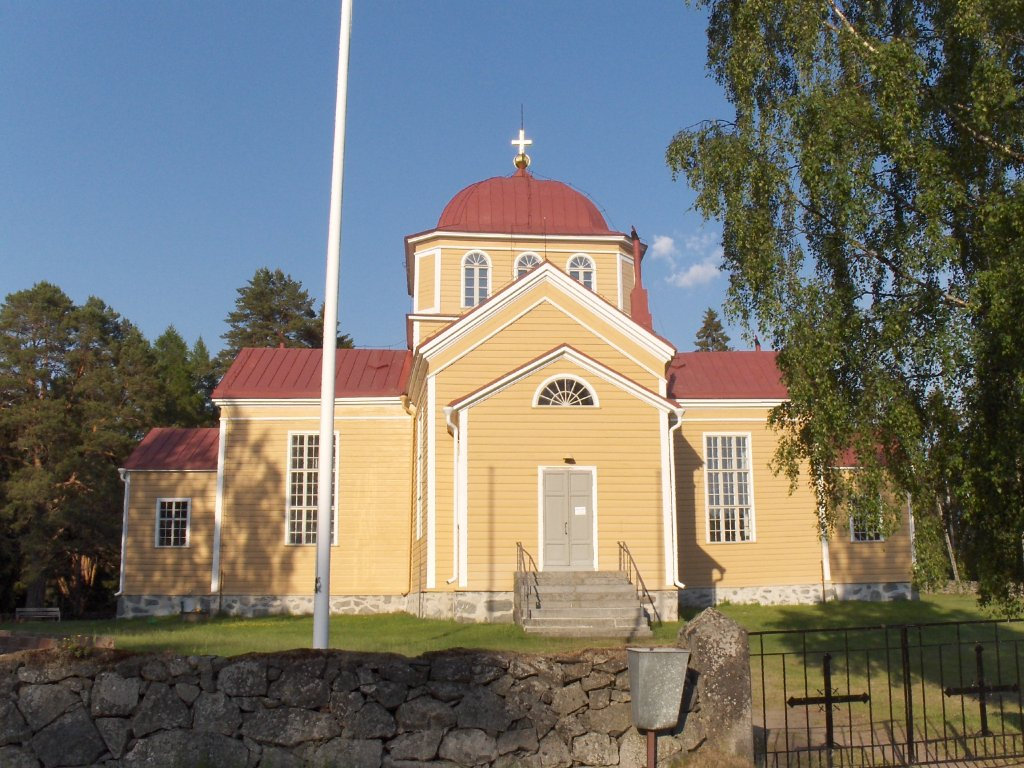 Uukuniemen kirkko ulkoa pääovelle päin kuvattuna.